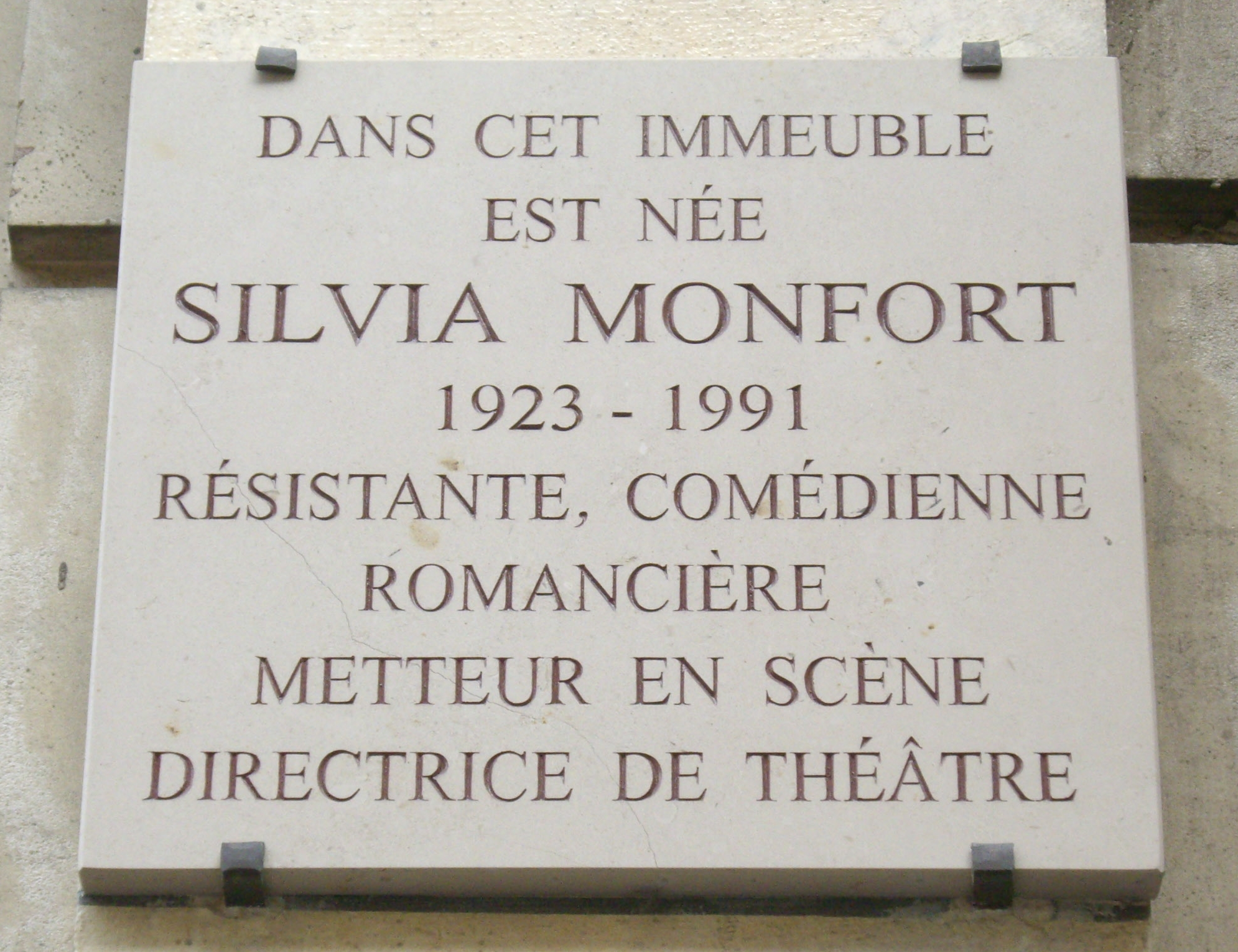 Plaque apposée au n° 11 bis de la rue Elzévir, Paris 3e, où naquit Silvia Monfort (1923-1991) — résistante, commédienne, romancière, metteur en scène, directrice de théâtre — le 6 juin 1931.